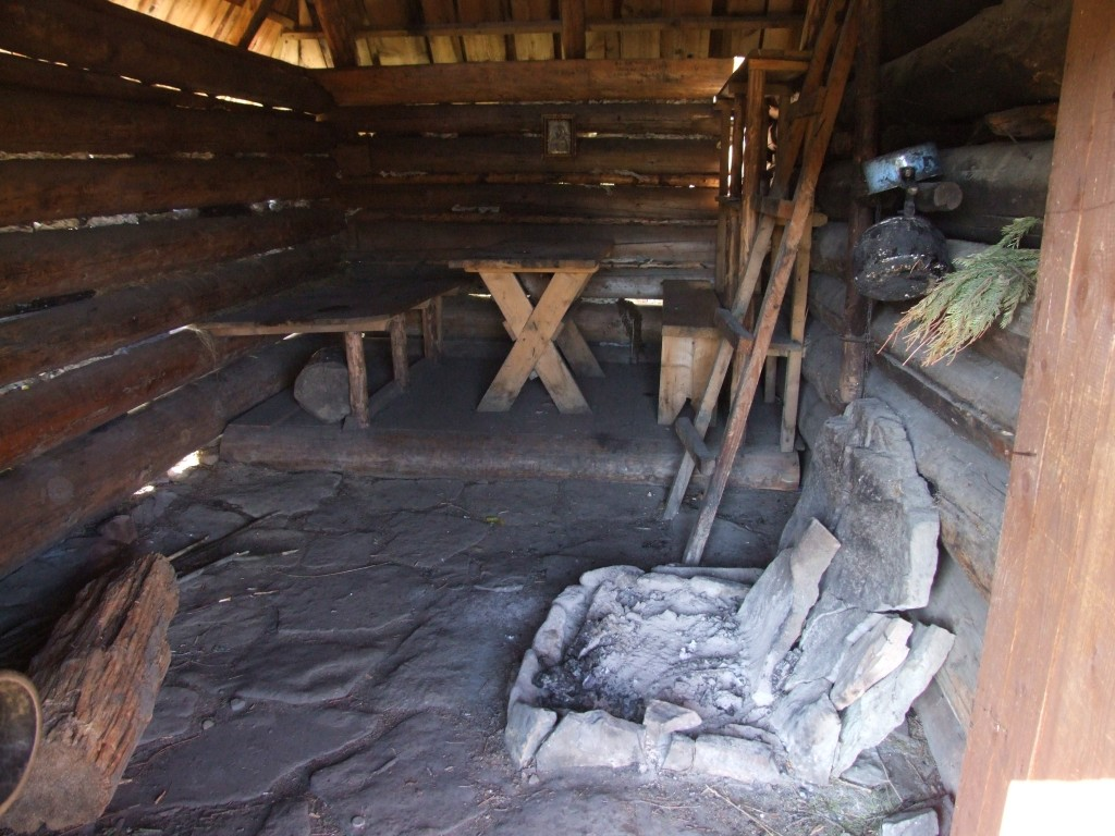 Wnętrze szałasu na polanie Stawieniec w Gorcach